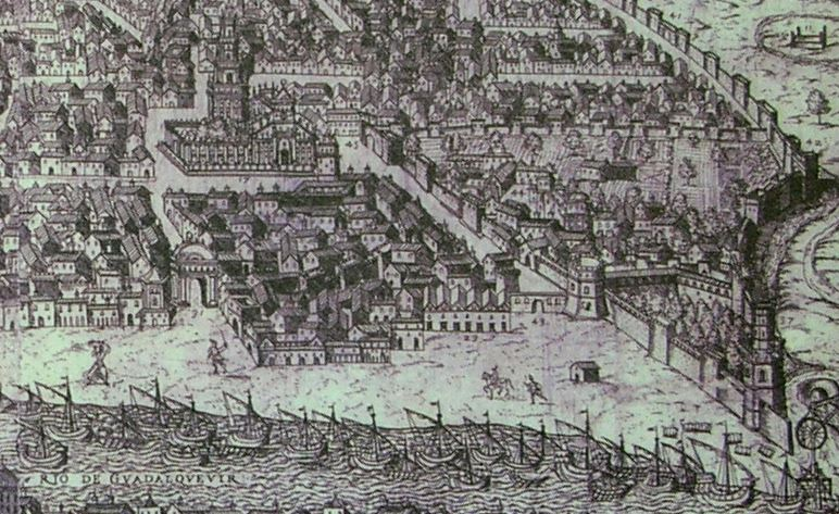 Detalle de la vista de Sevilla realizada por Ambrosio Brambilla hacia 1585.